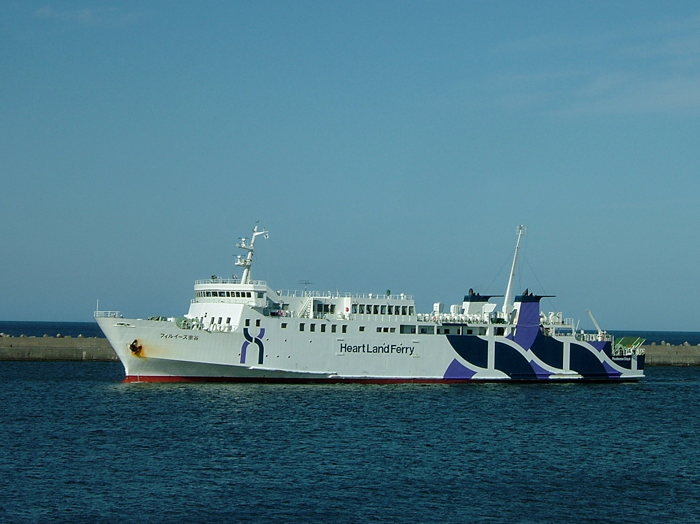 稚内港を航行するフィルイーズ宗谷（フェリーターミナル内から撮影） IMO number: 9238143